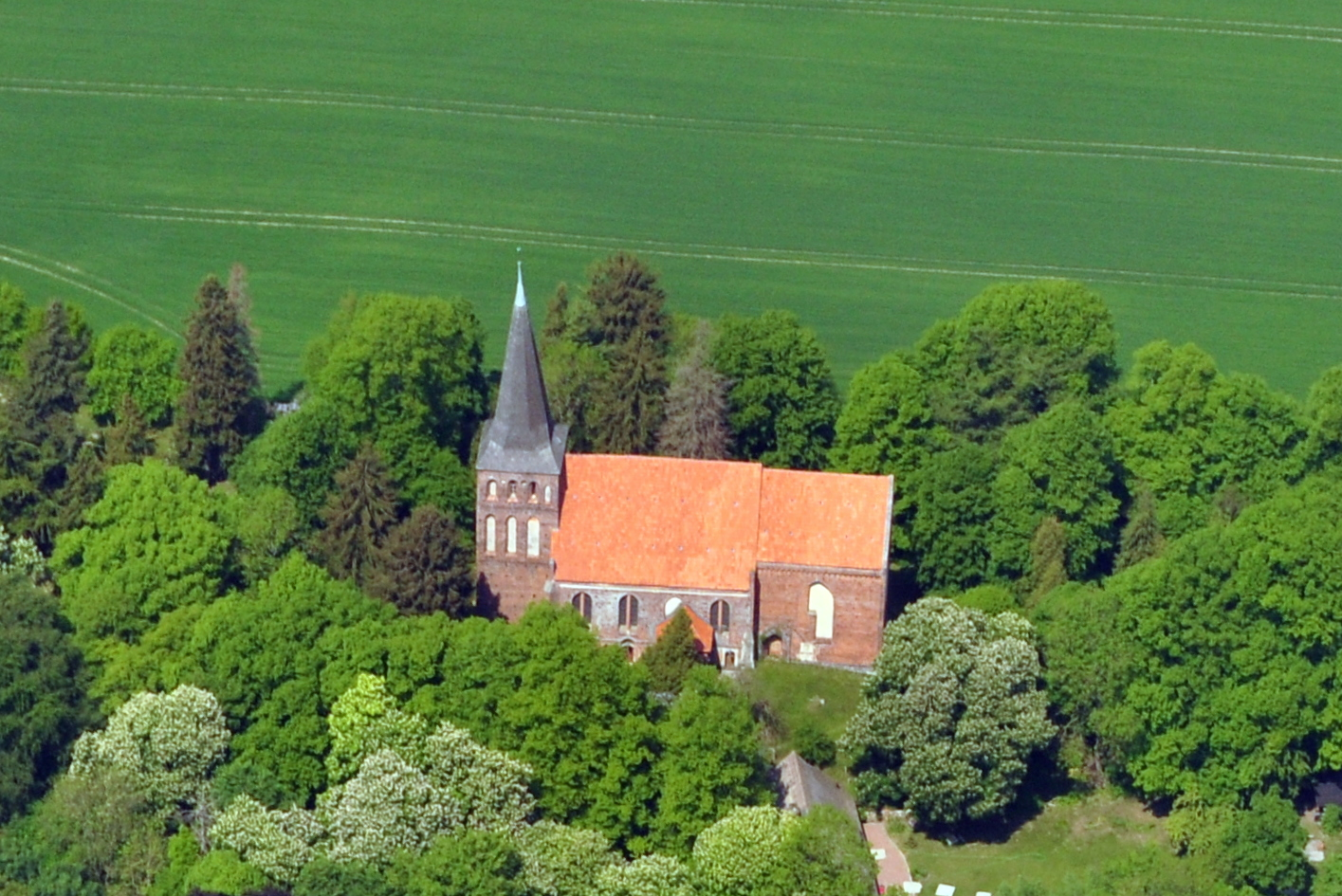 Die Bilder wurden von mir während eines einstündigen Rundflugs ab Flugplatz Güttin am 21. Mai 2011 aufgenommen. Die Bildbeschreibung steht im Dateinamen. Aufgenommen mit einer Nikon D5000 durch das Seitenfenster des Flugzeugs.